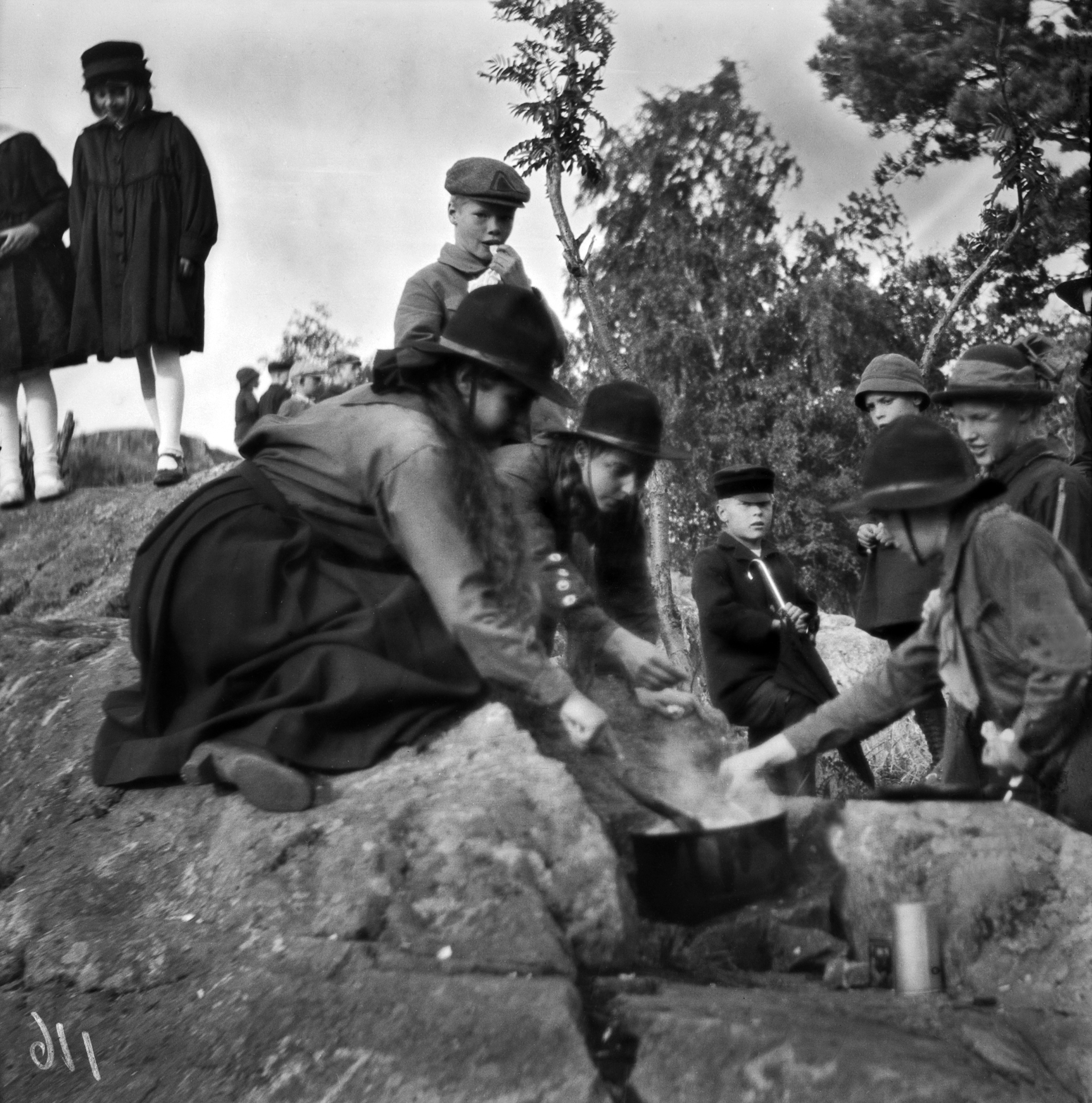 Lastenpäivä 1919. Tyttöjen partioleiri Kaivopuistossa. -- negatiivi, nitraatti, mv